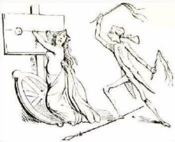 Flaggelation